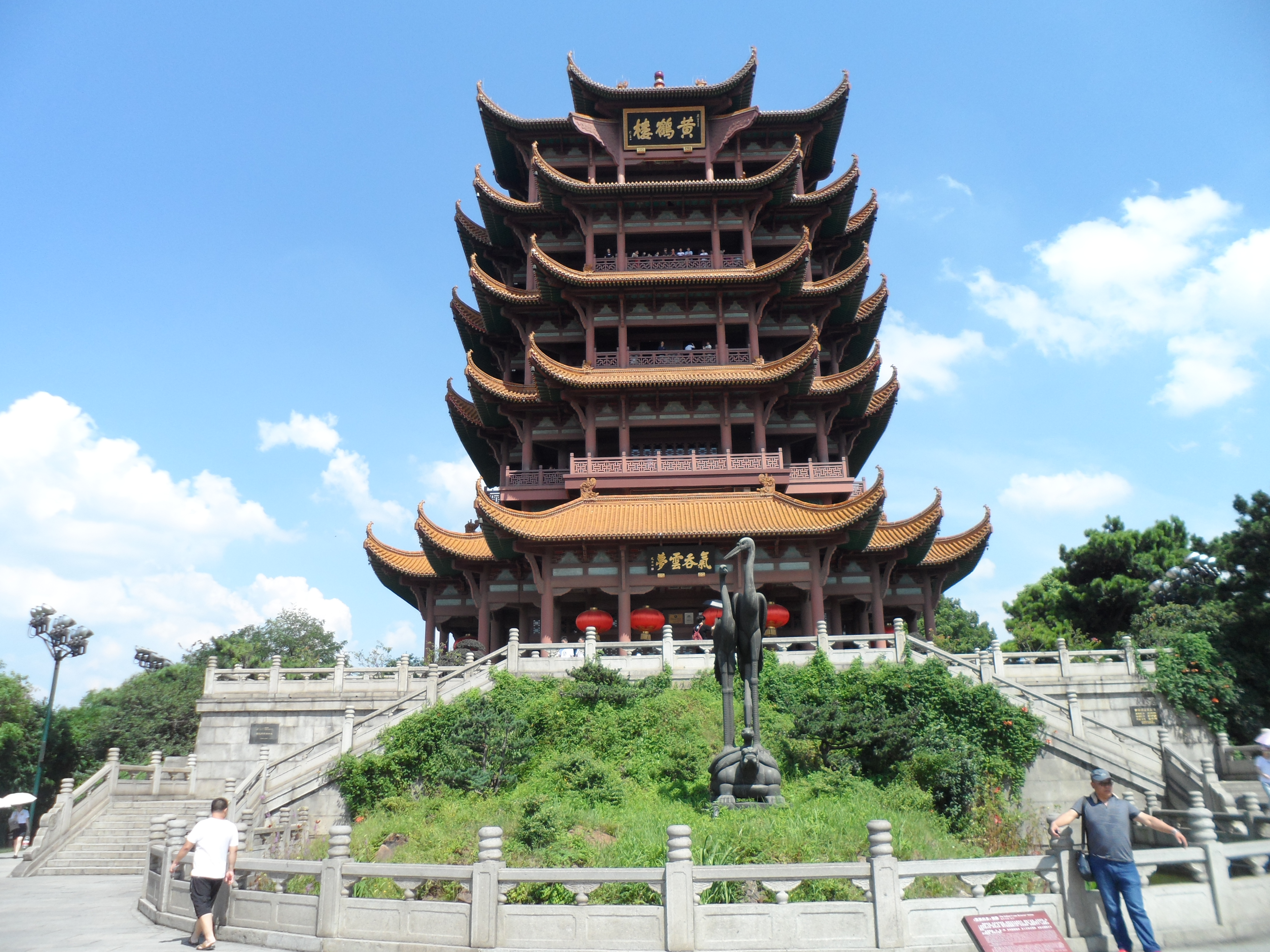 武汉黄鹤楼